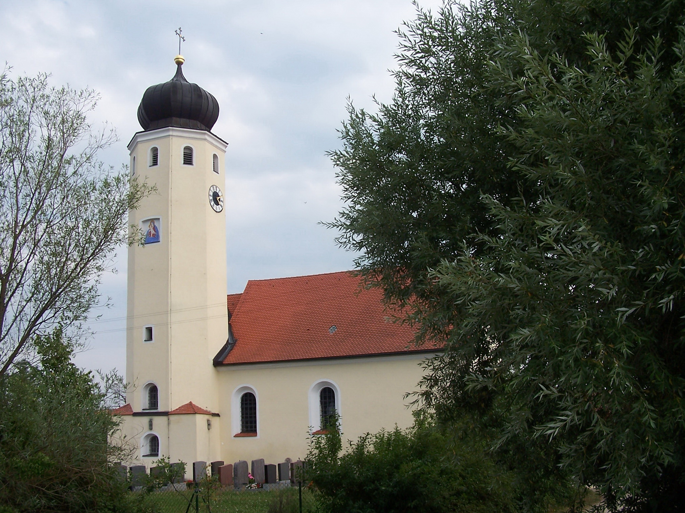 Barbing, Friesheim, Hauptstraße 23. Katholische Filialkirche St. Maria, Saalbau mit eingezogenem Chor und Flankenturm mit Zwiebelhaube, spätgotisch, im 18. Jahrhundert verändert; mit Ausstattung.